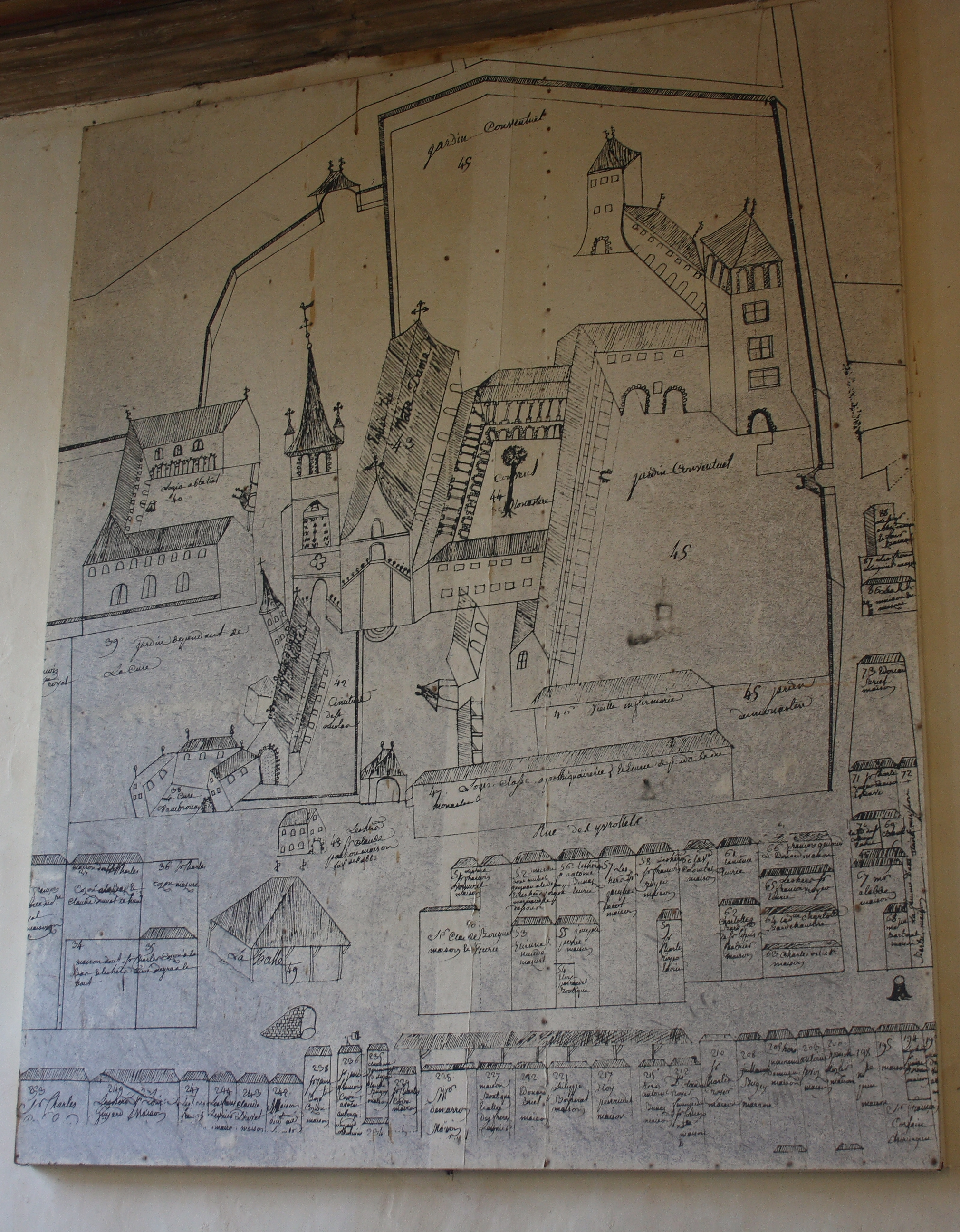 Ehemalige Abteikirche Notre-Dame in Ambronay, einer Gemeinde im Département Ain in der französischen Region Rhône-Alpes, Plan des Klosters im Treppenhaus des Kreuzgangs